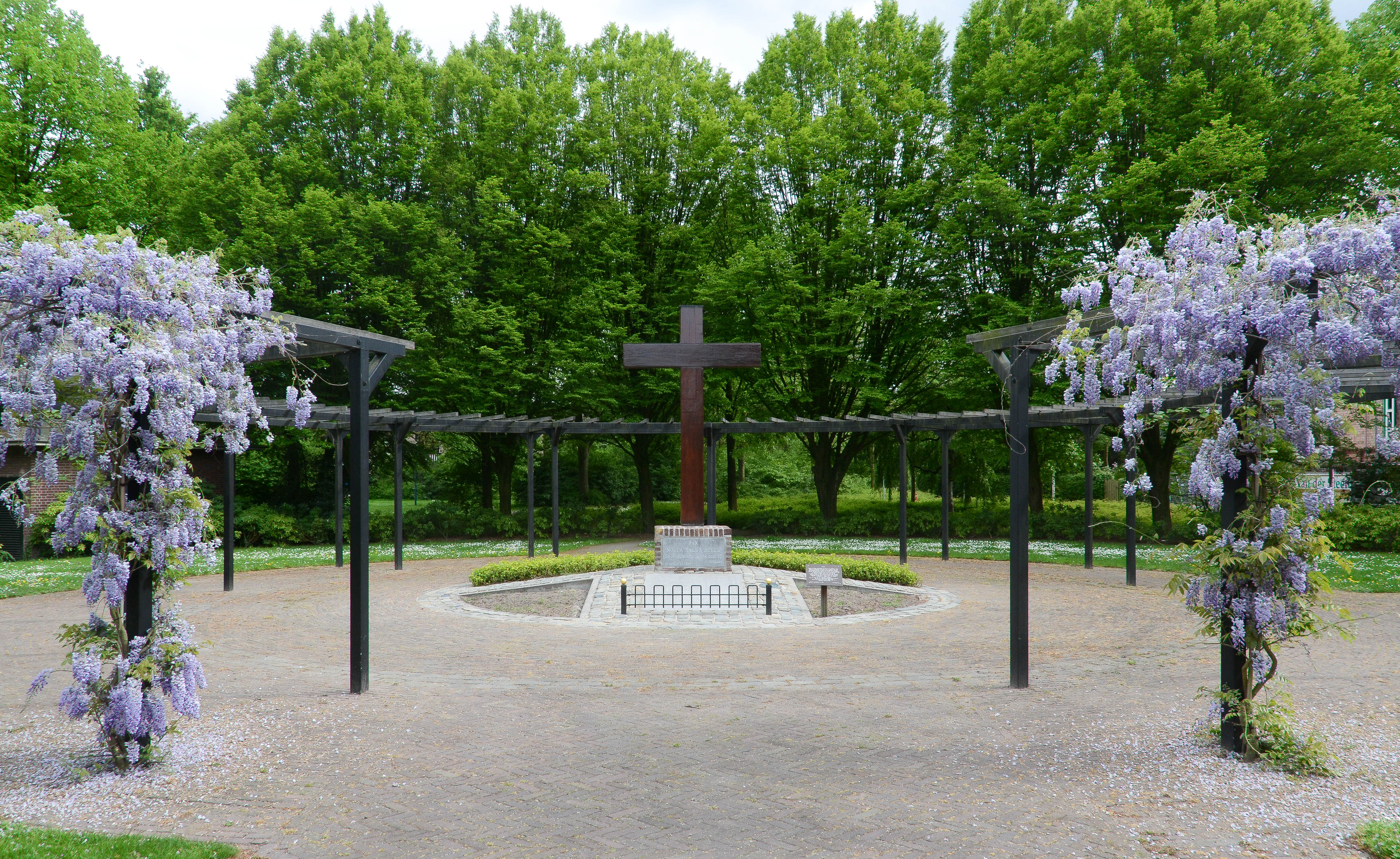 Monument voor Bestse oorlogsslachtoffers aan de Oirschotseweg in Best.